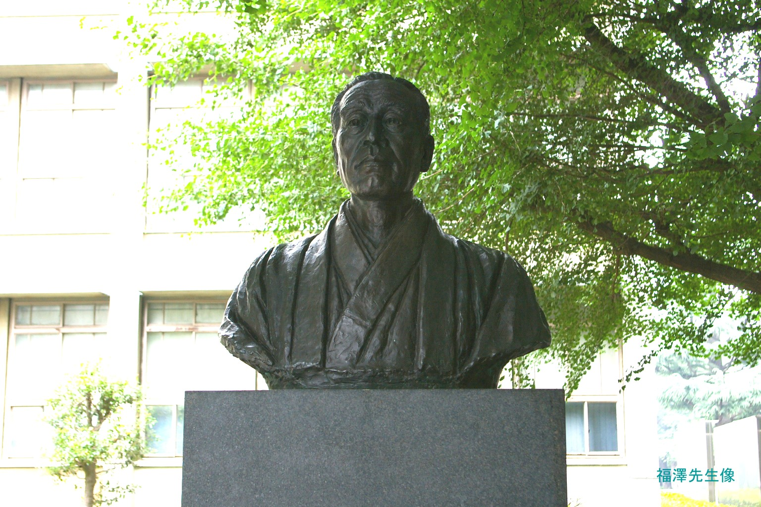 2009.5日本国内で塾生 (talk)が撮影。